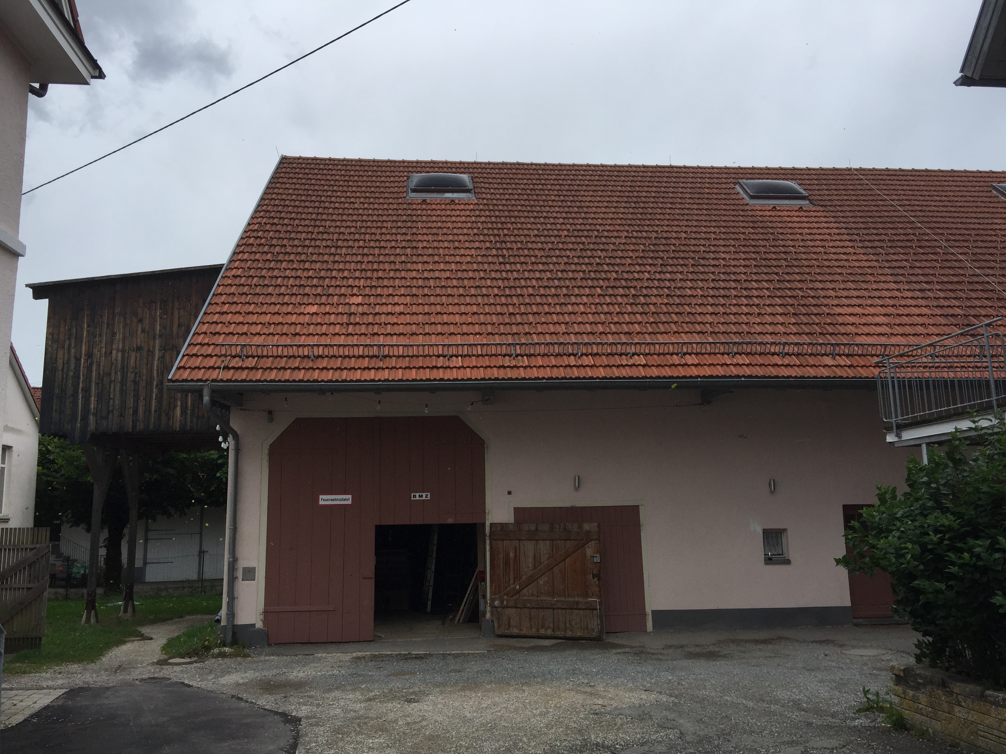 Theater Lindenhof in Melchingen: Scheune, in der sich der Spielraum befindet.